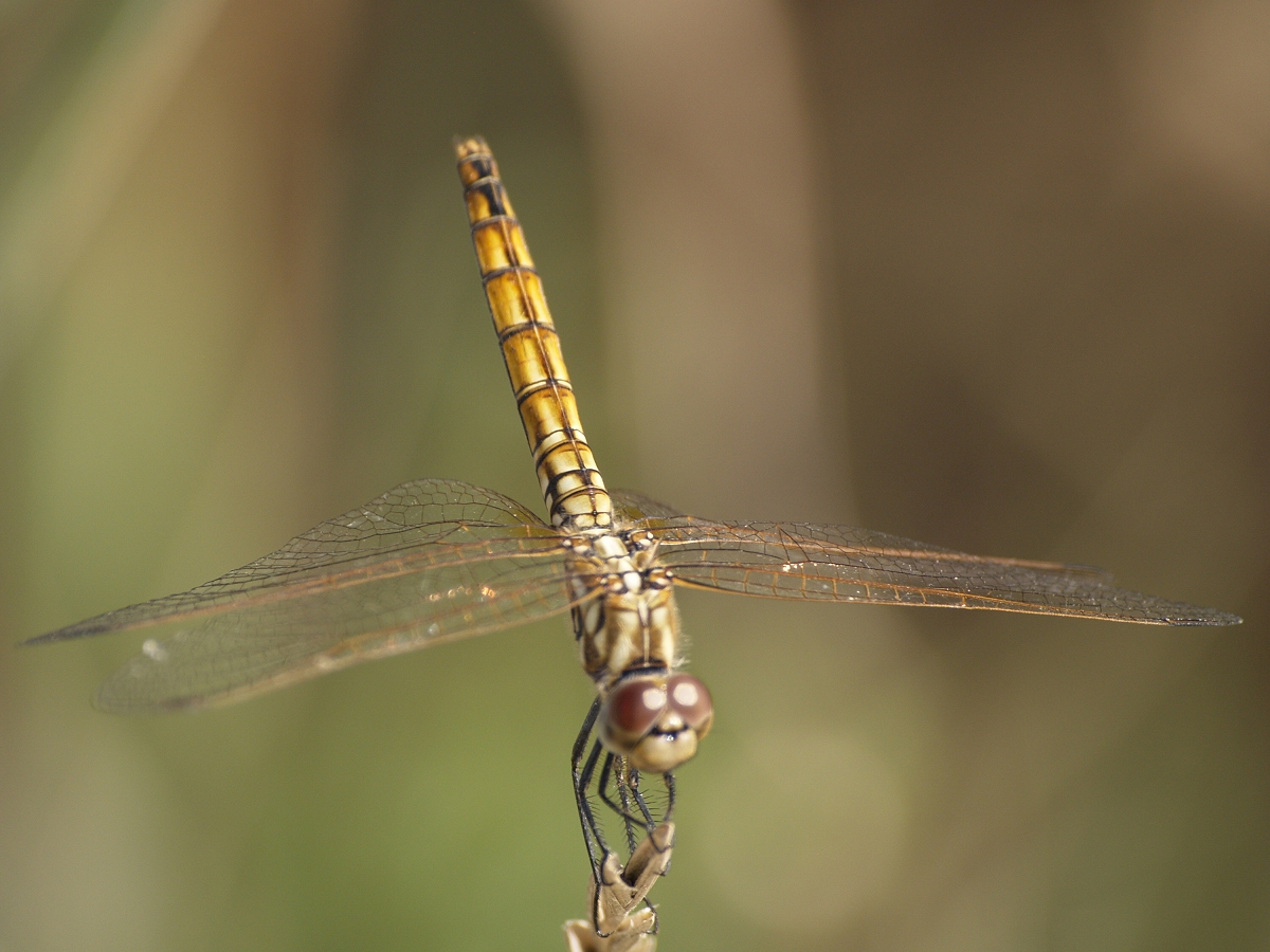 Trithemis annulata femella